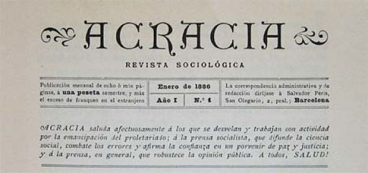 Acracia est une revue d'orientation anarchiste publiée en espagnol à Barcelone de janvier 1886 à juin 1888.